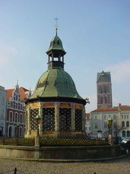 Wismar - Wasserkunst am Marktplatz